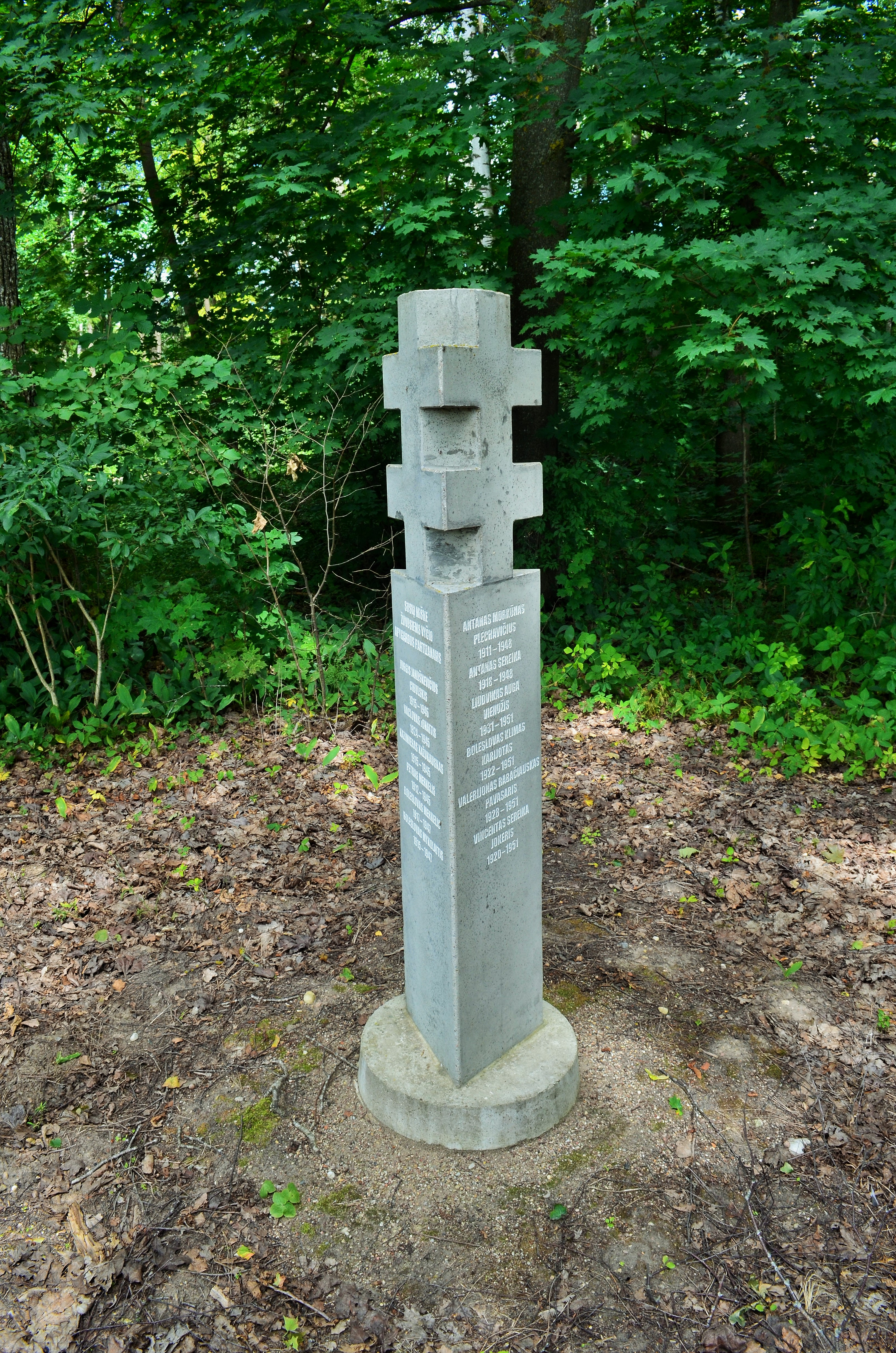 Paminklas žuvusiems partizanams Sosių miške, tarp N. Lažų ir N. Bakainių, Kėdainių raj.